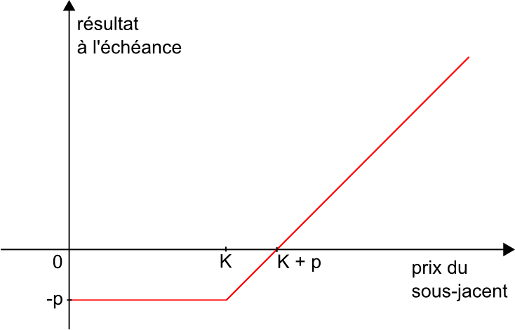 Résultat à l'échéance d'un acheteur d'un call - Pay-off of a long call